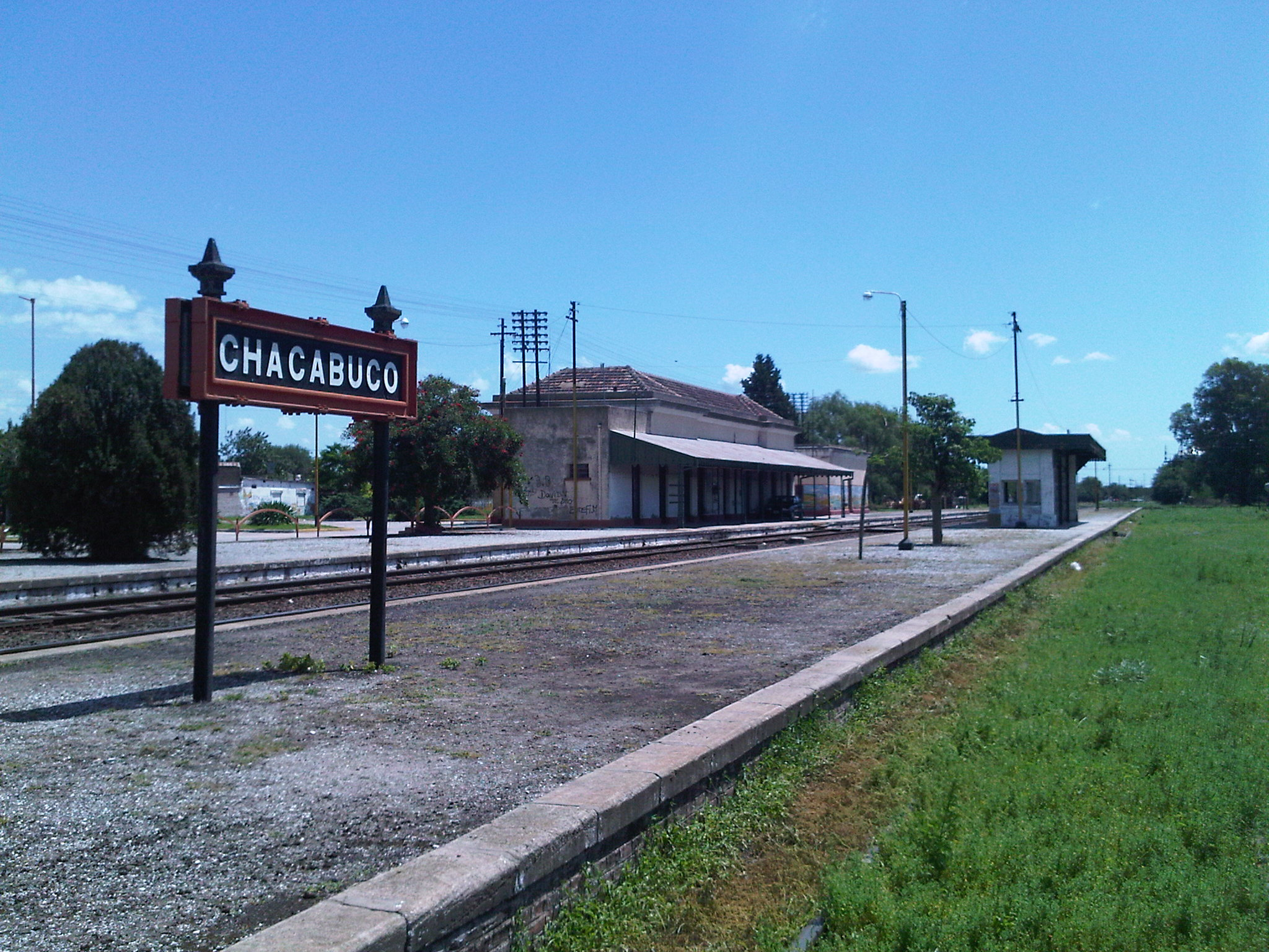 Estación Chacabuco - Estación Ferroviaria partido de Chacabuco, Provincia de Buenos Aires, Argentina